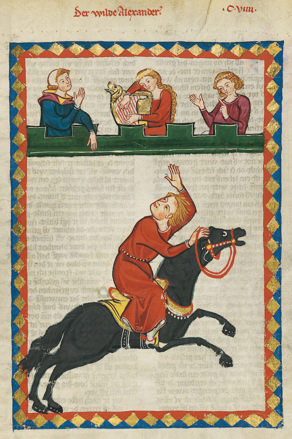 Codex Manesse, UB Heidelberg, Cod. Pal. germ. 848, fol. 412r: Der wilde Alexander